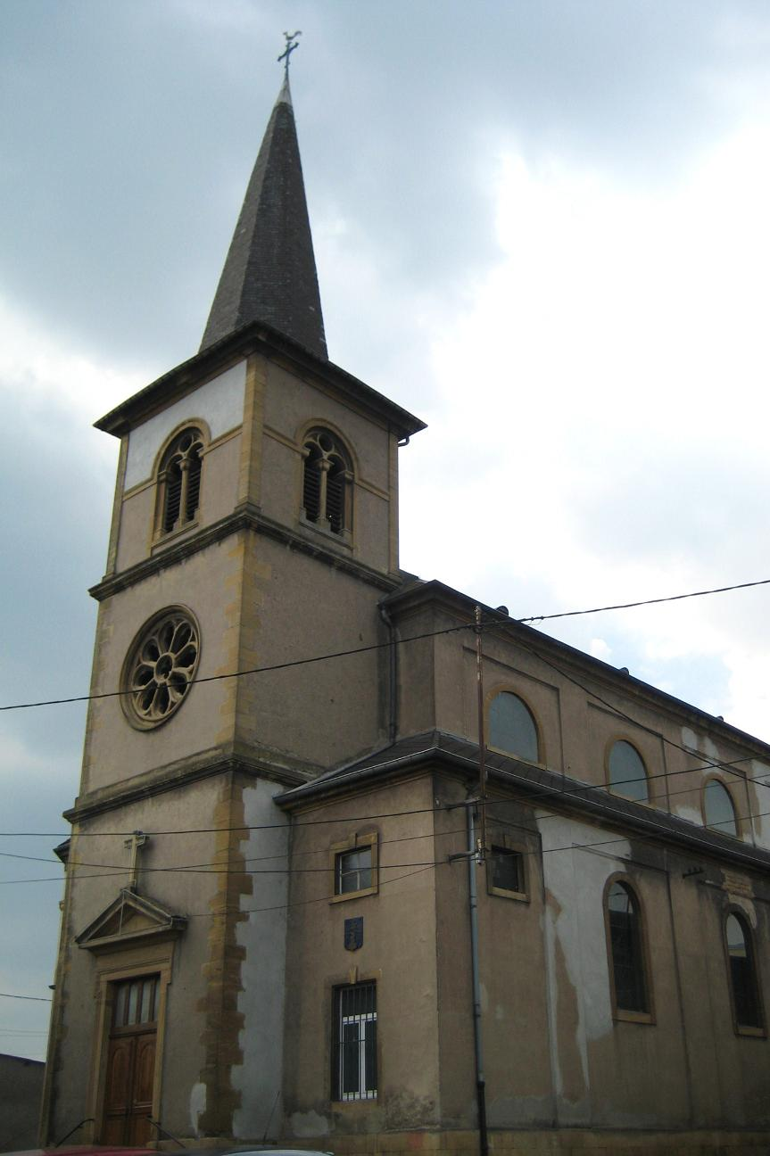 Eglise de Vitry-sur-Orne